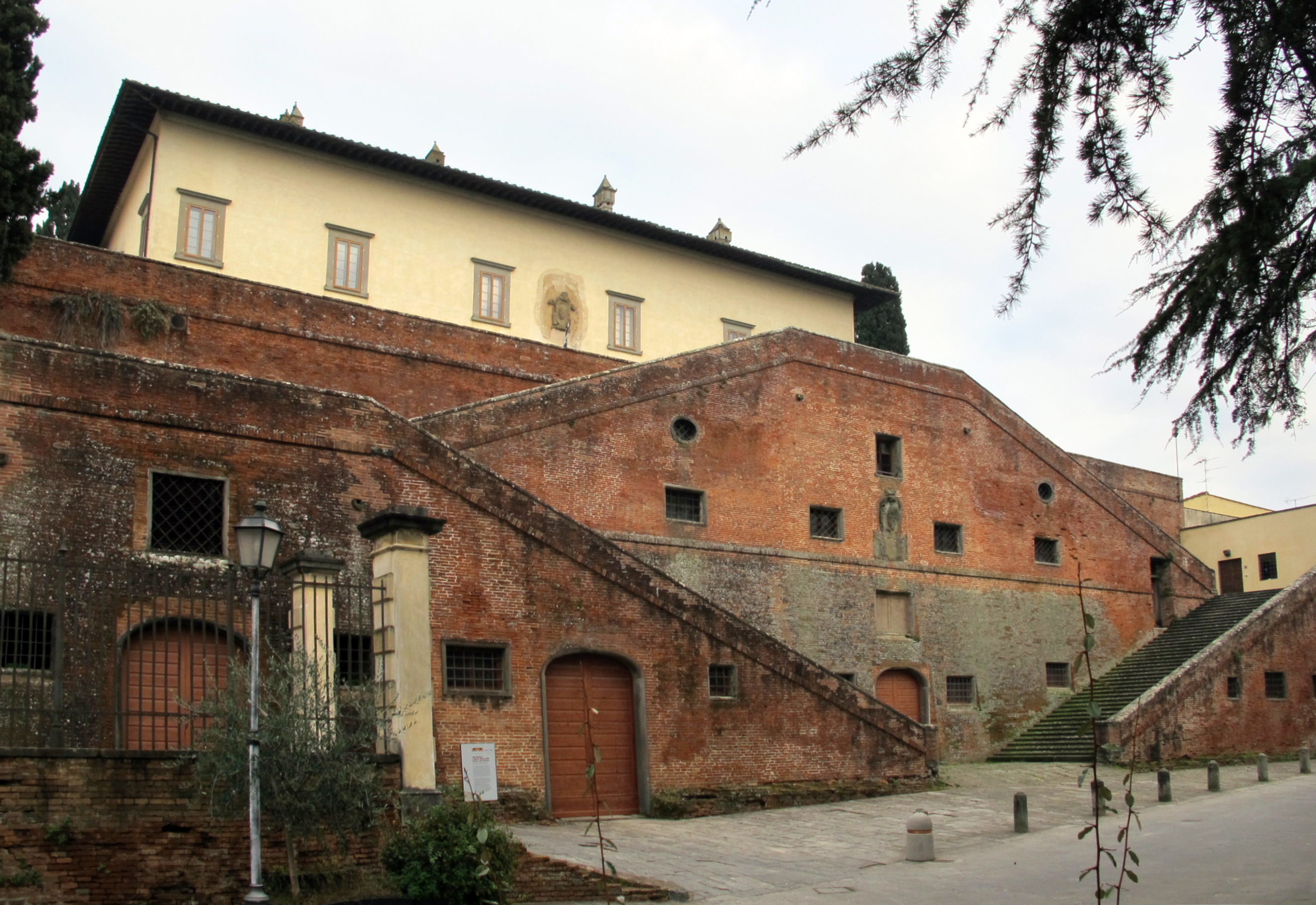 Villa di cerreto guidi, rampe